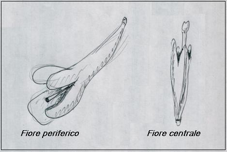 Knautia arvensis